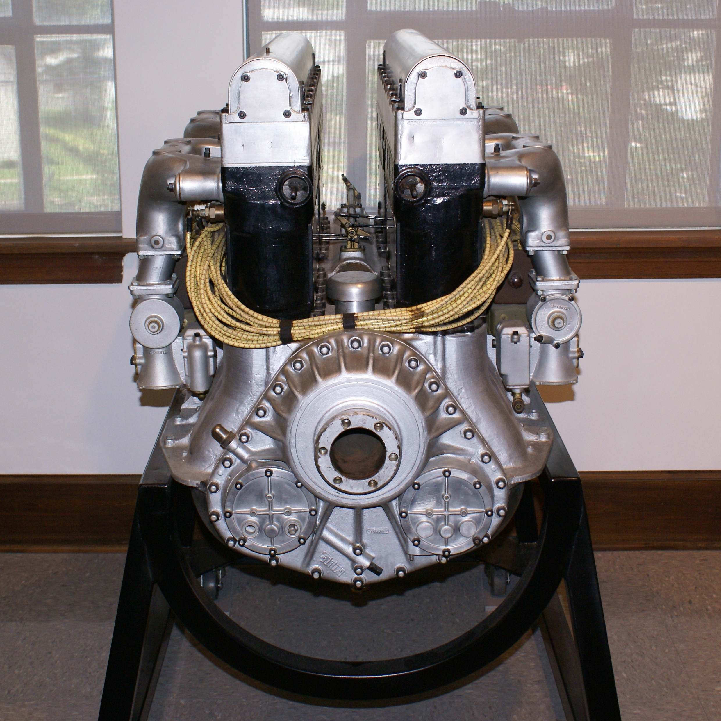 King-Bugatti U-16 aero engine